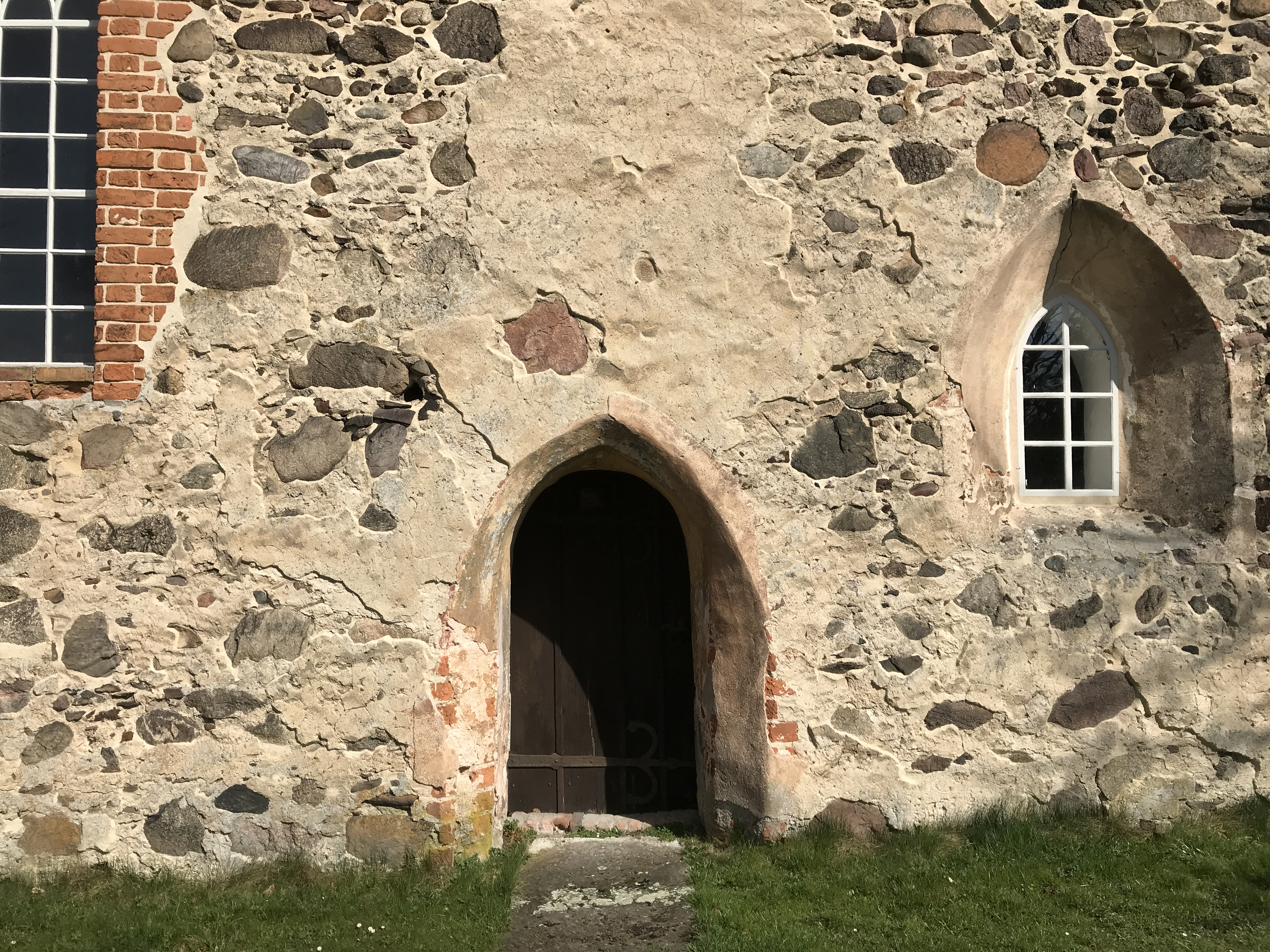 Die Dorfkirche Walddrehna ist eine mittelalterliche Feldsteinkirche, dessen Baugeschichte unter Experten umstritten ist.